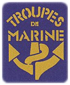 logo insigne des troupes de marine